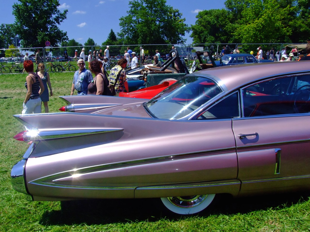 Quelle: selbst fotografiert, 06/2007 Fotograf: Späth Chr.